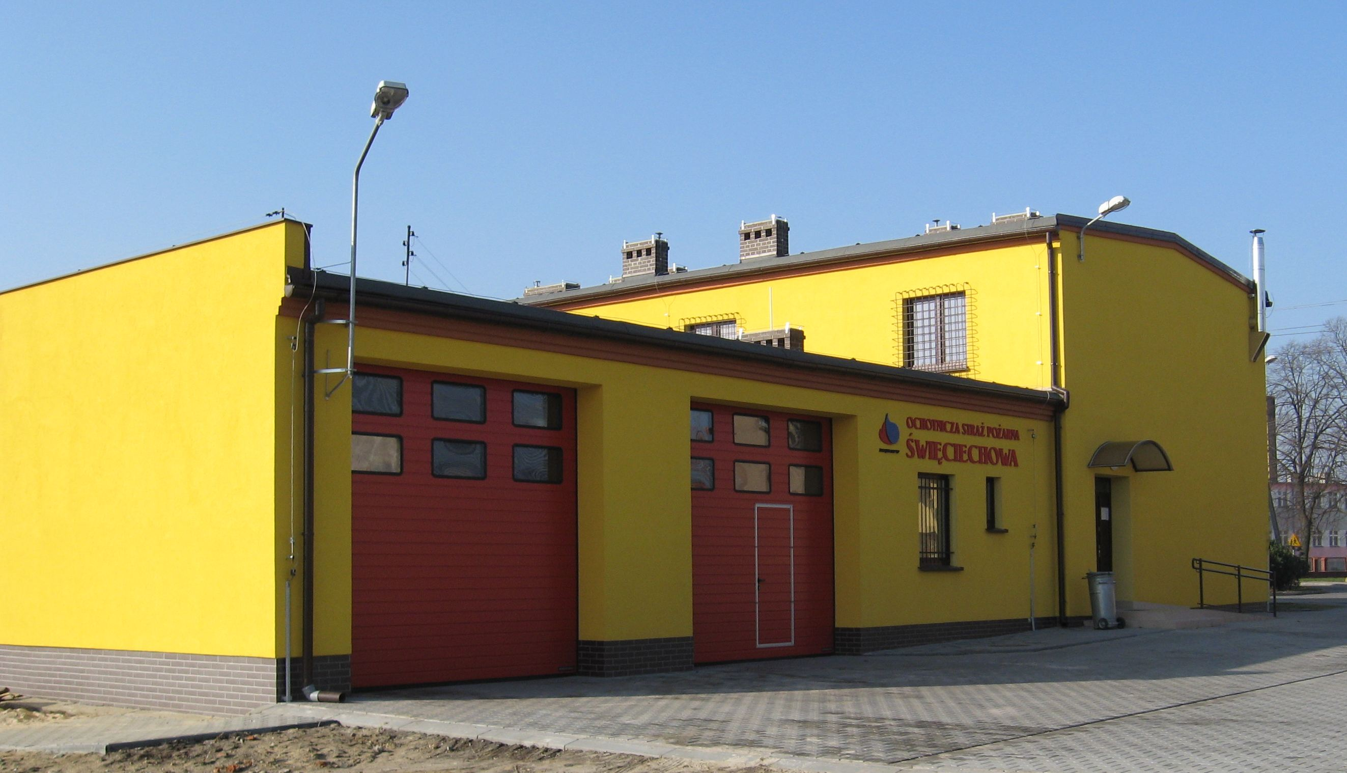 Ochotnicza Straż Pożarna Święciechowa.